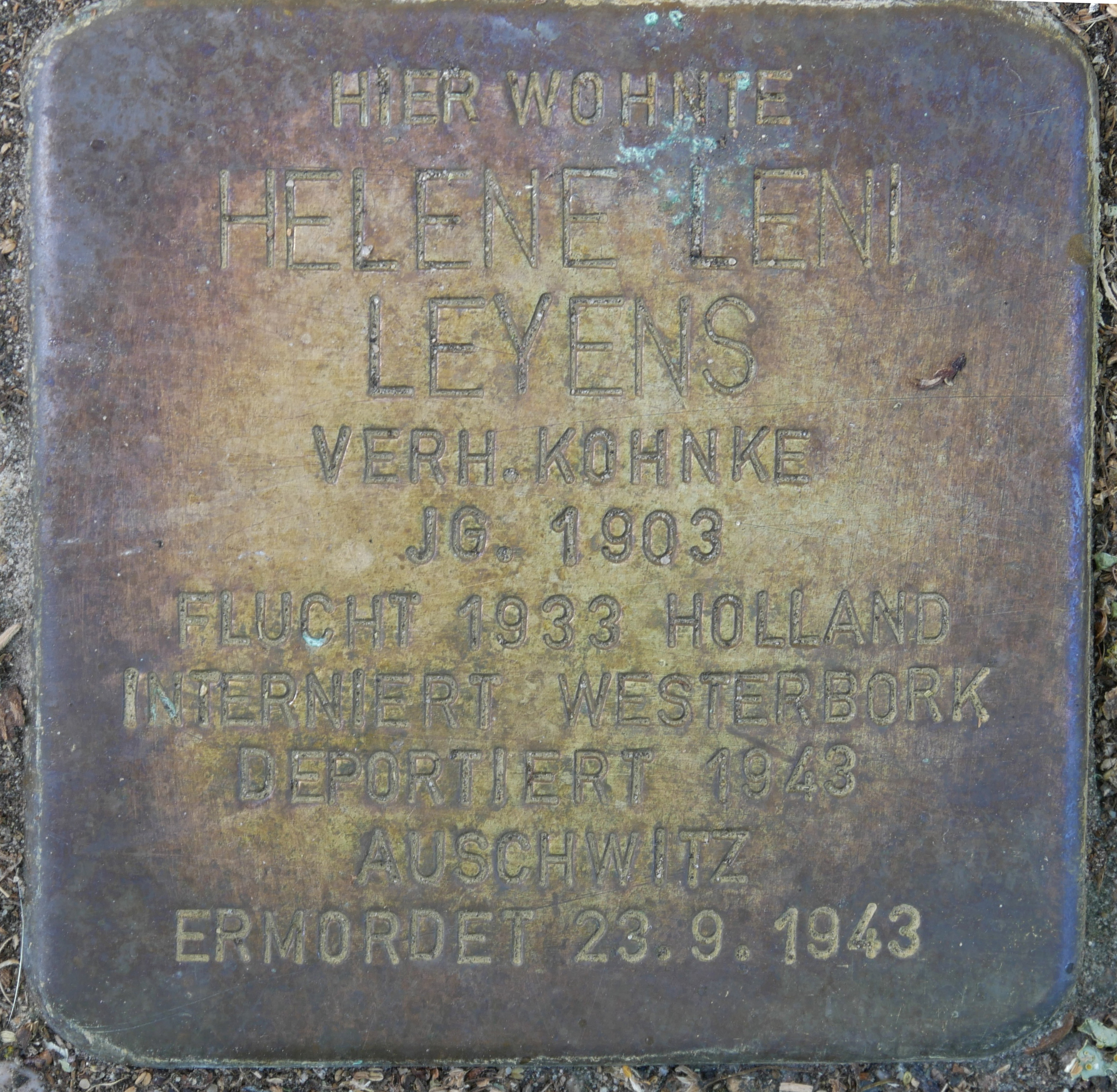 Stolpersteine Wesel: Leyens, Helene Leni